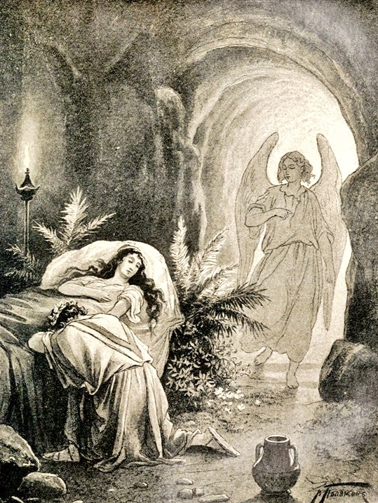 Illustrazione di V. A. Poljakov per il poema di Michail Lermontov "L'angelo della morte"